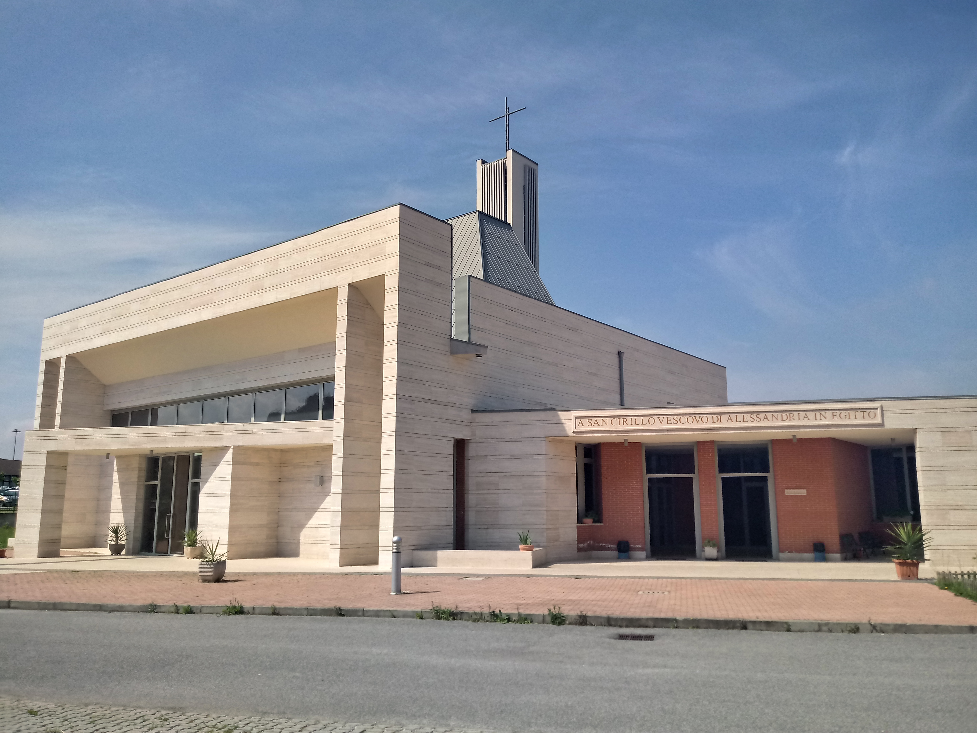 Parrocchia di San Cirillo Alessandrino